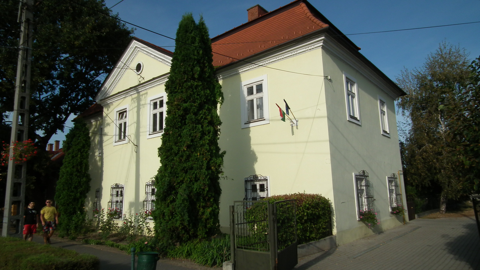 v. Szepessy kúria (Nyékládháza, Kossuth Lajos u. 60.) This is a photo of a monument in Hungary. Identifier: 3005